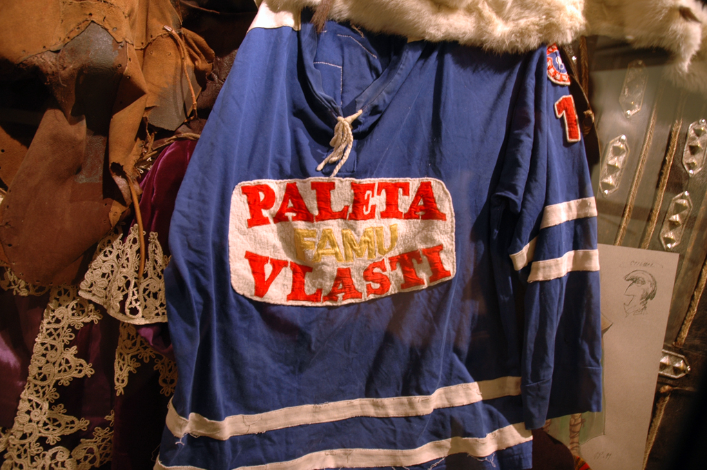 Theodor Pištěk, hokejový dres klubu Paleta vlasti, instalace Národní galerie Praha, 1962